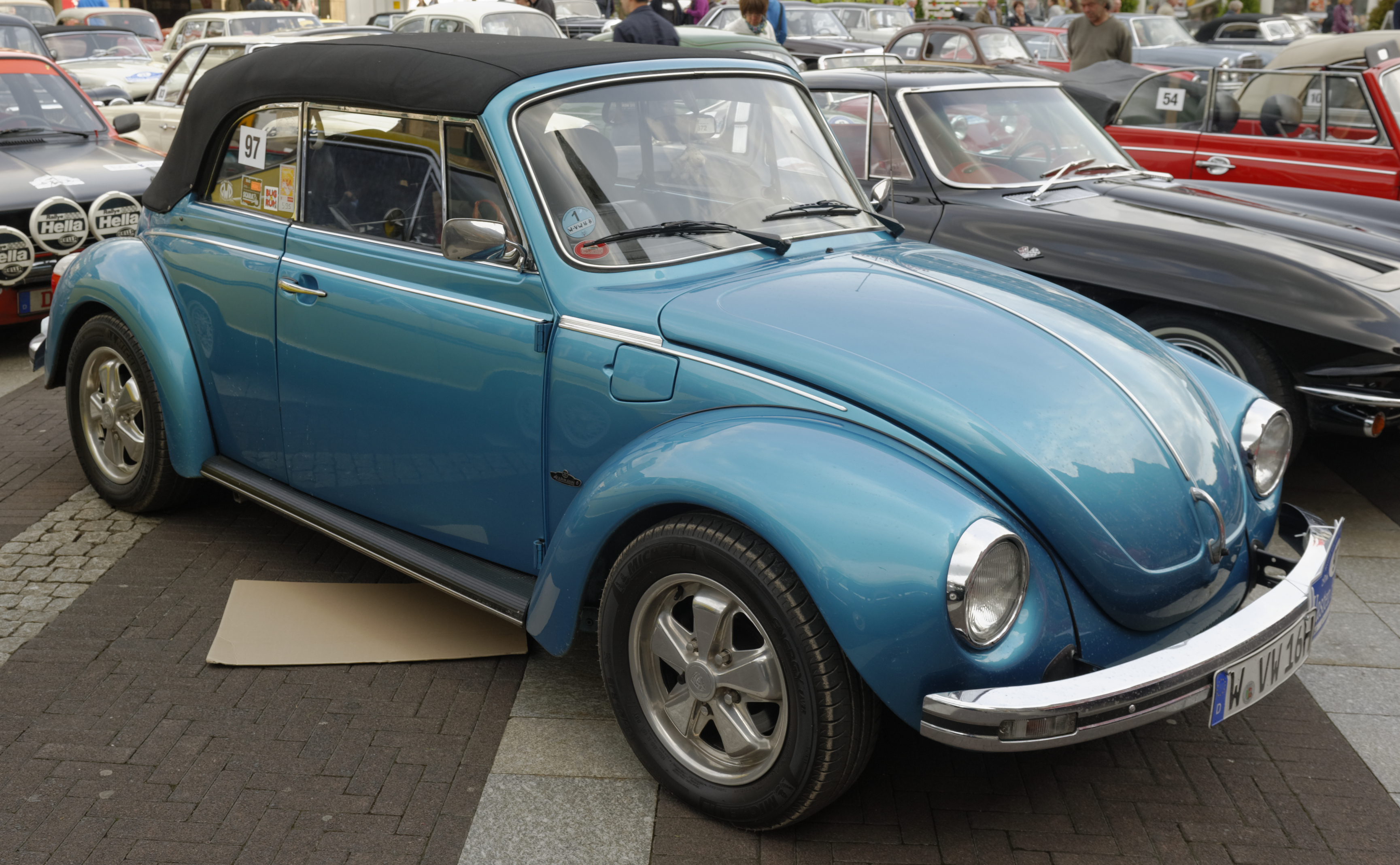 Oldtimershow in Remscheid Juni 2013